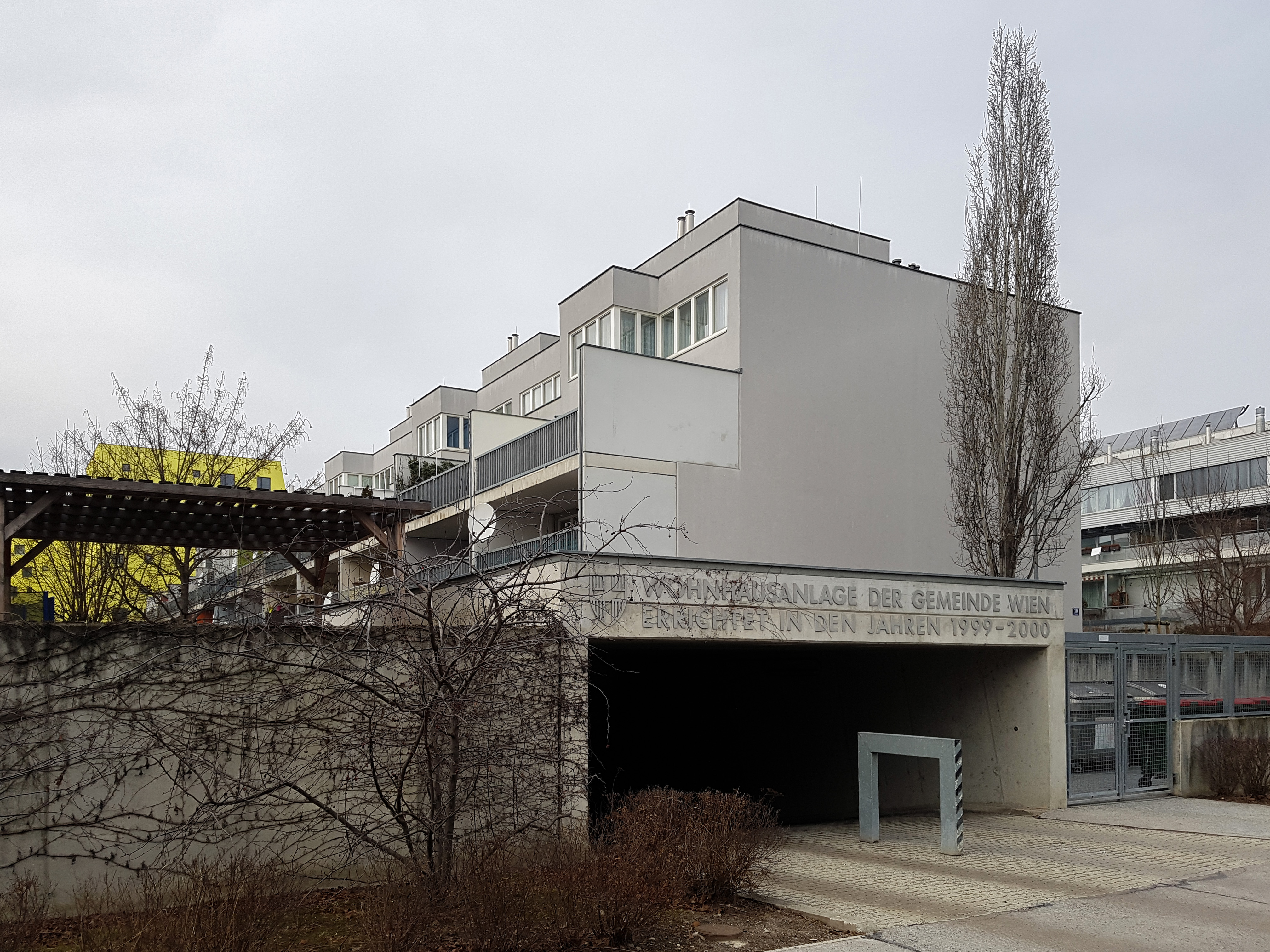 Wohnhausanlage Dernjacgasse 10 This media shows the Vienna residential building (Gemeindebau) with the ID 1711.